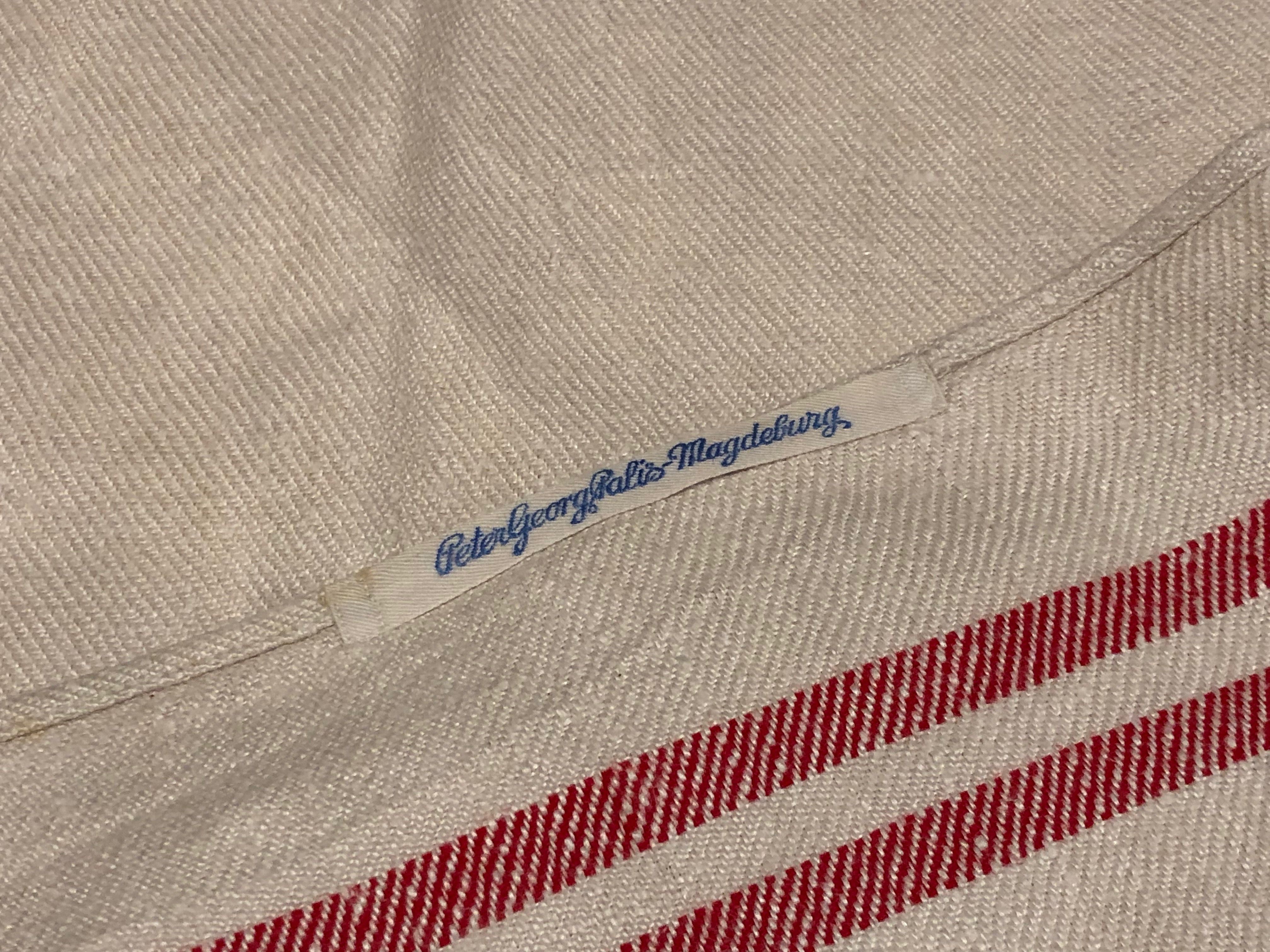 Gestickter Name Peter Georg Palis auf Leinentuch (Datierung leider nicht genau feststellbar)